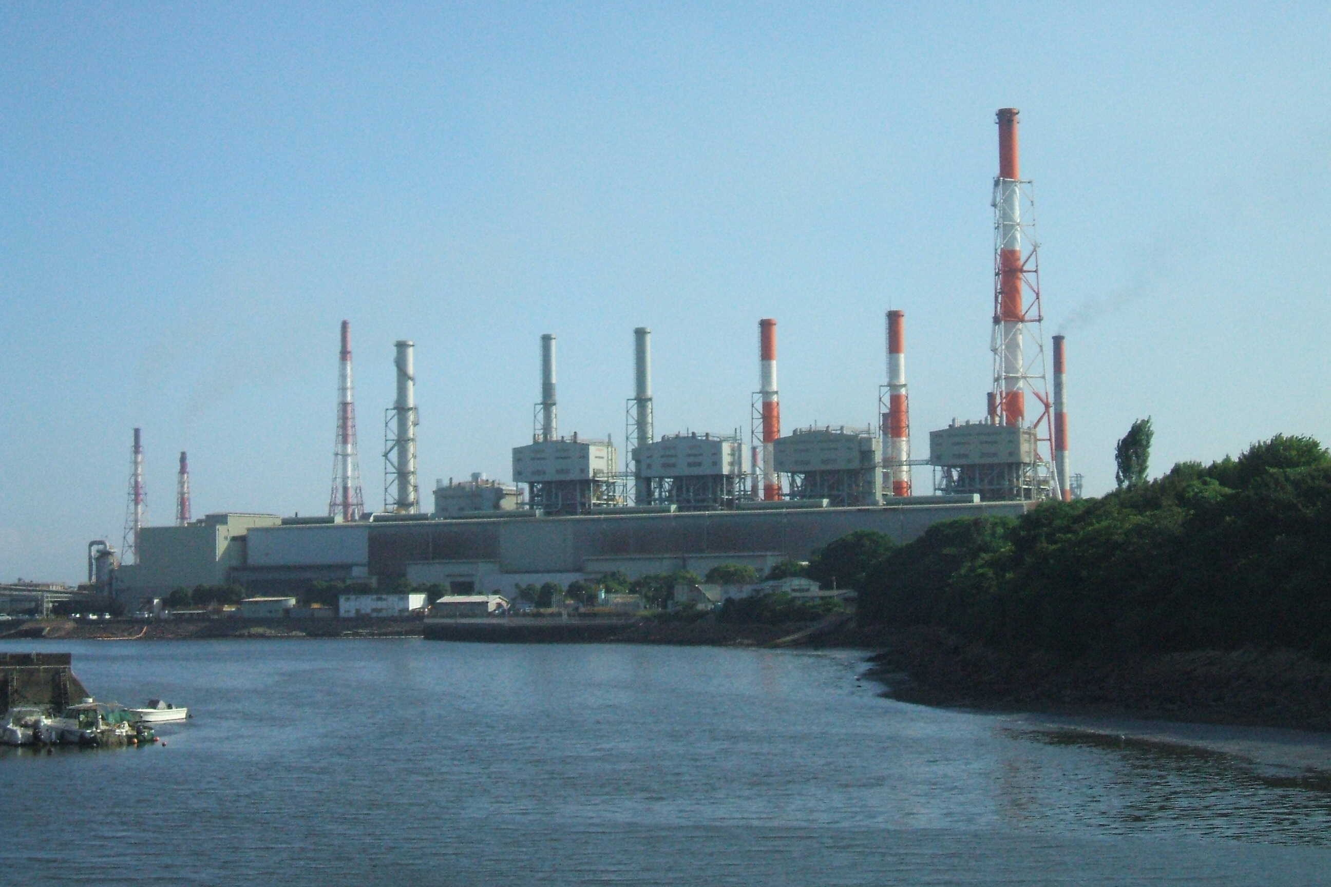 広島県福山市にある福山共同発電所を北側より全景を撮影